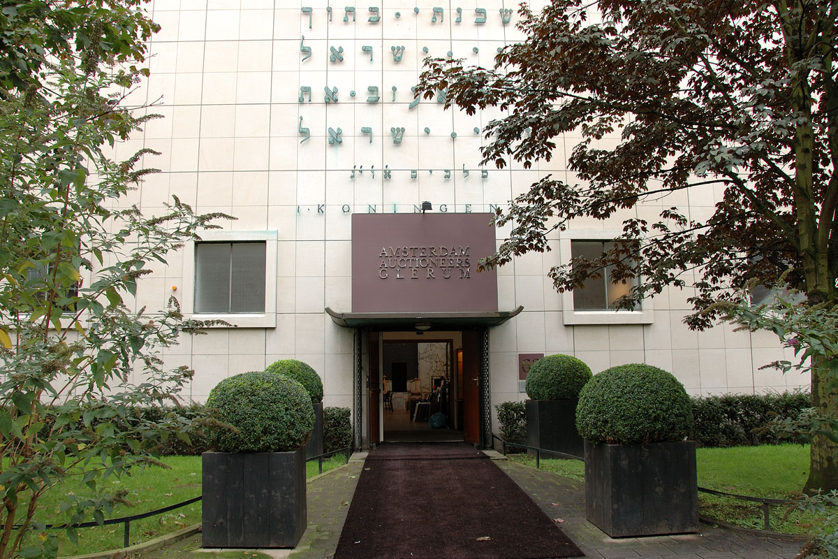 De Synagoge in de Lekstraat, ontworpen door A. Elzas en gebouwd in 1936-1937. Het gebouw is nu gedeeltelijk in gebruik als veilinghuis, voor een ander deel als synagoge